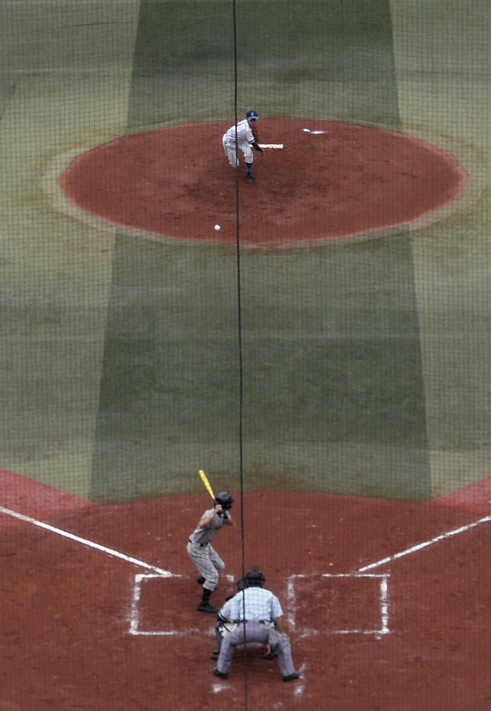 Yokohama Stadium